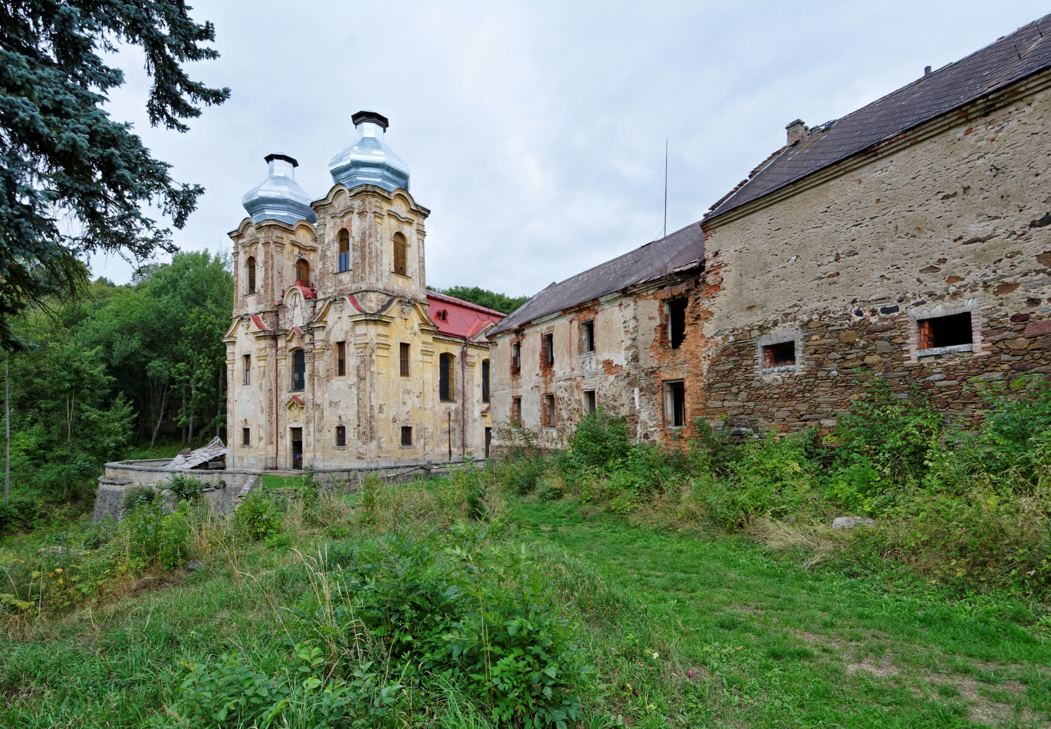 Kostel Navštívení Panny Marie ve Skocích u Žlutic, okr. Karlovy Vary. Pohled od jihovýchodu.